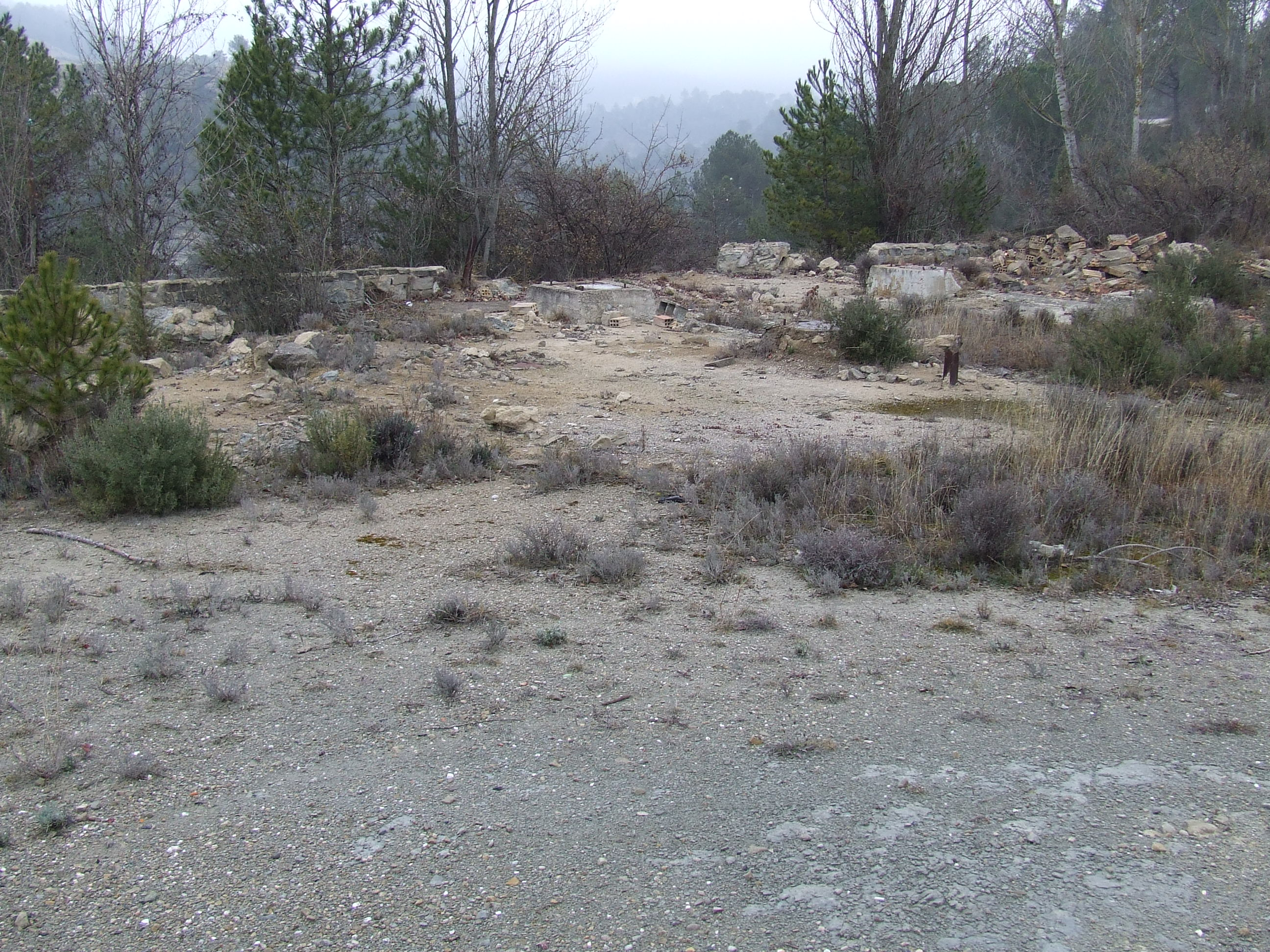 Coll Girant (Monistrol de Calders, Moianès)